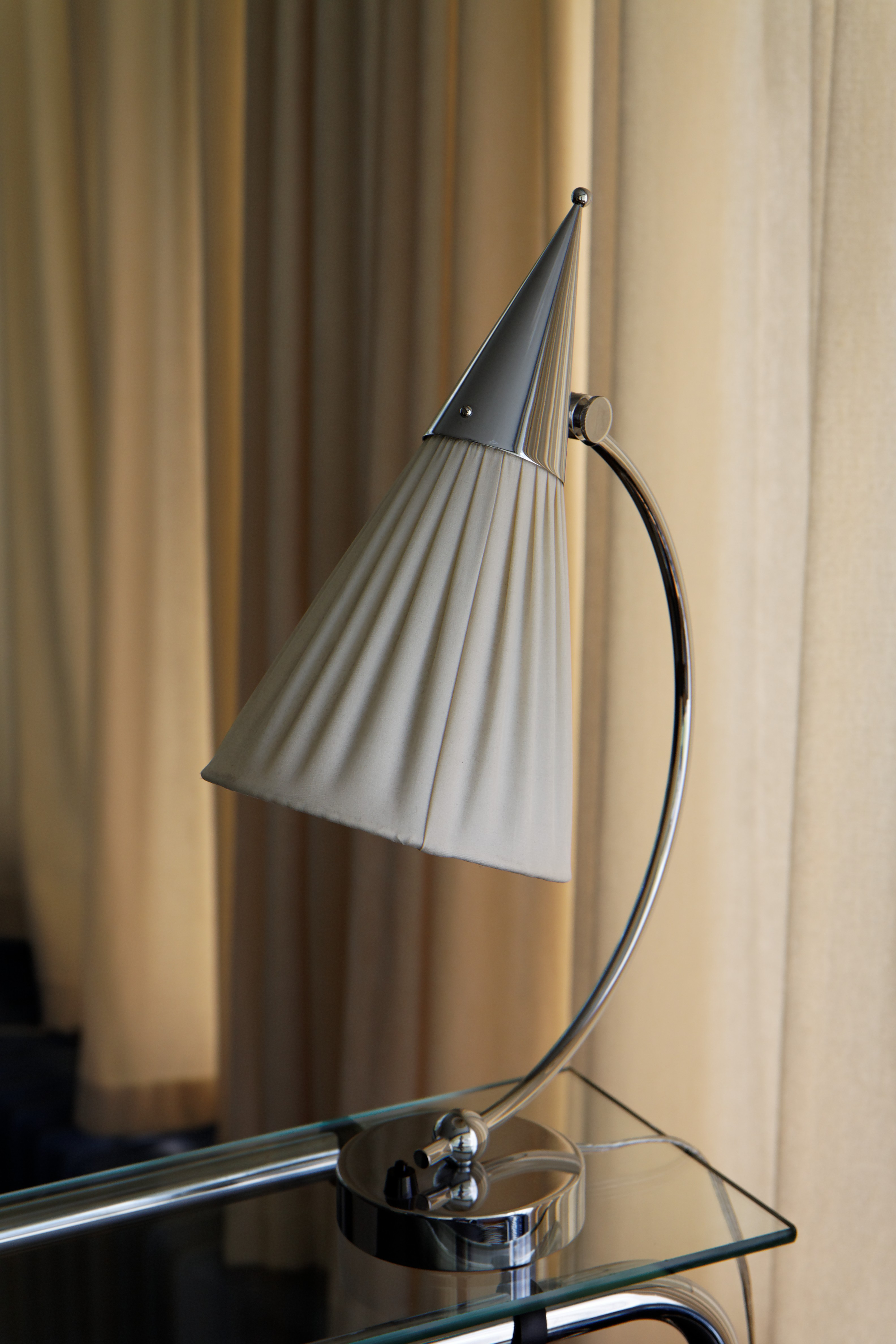 Titel: Tafellamp Giso 403a Jaar: voor 1929 Ontwerper: W.H. Gispen Omschrijving: Lampje op verchroomd metalen voet en kap van shantung zijde. Collectie: NAi Objectnummer: 235 Tag: 24010 Titel: Tafellamp Giso 403a Jaar: voor 1929 Ontwerper: W.H. Gispen Omschrijving: Lampje op verchroomd metalen voet en kap van shantung zijde. Collectie: NAi Objectnummer: 235 090621-150655_ 0388_50D_raw